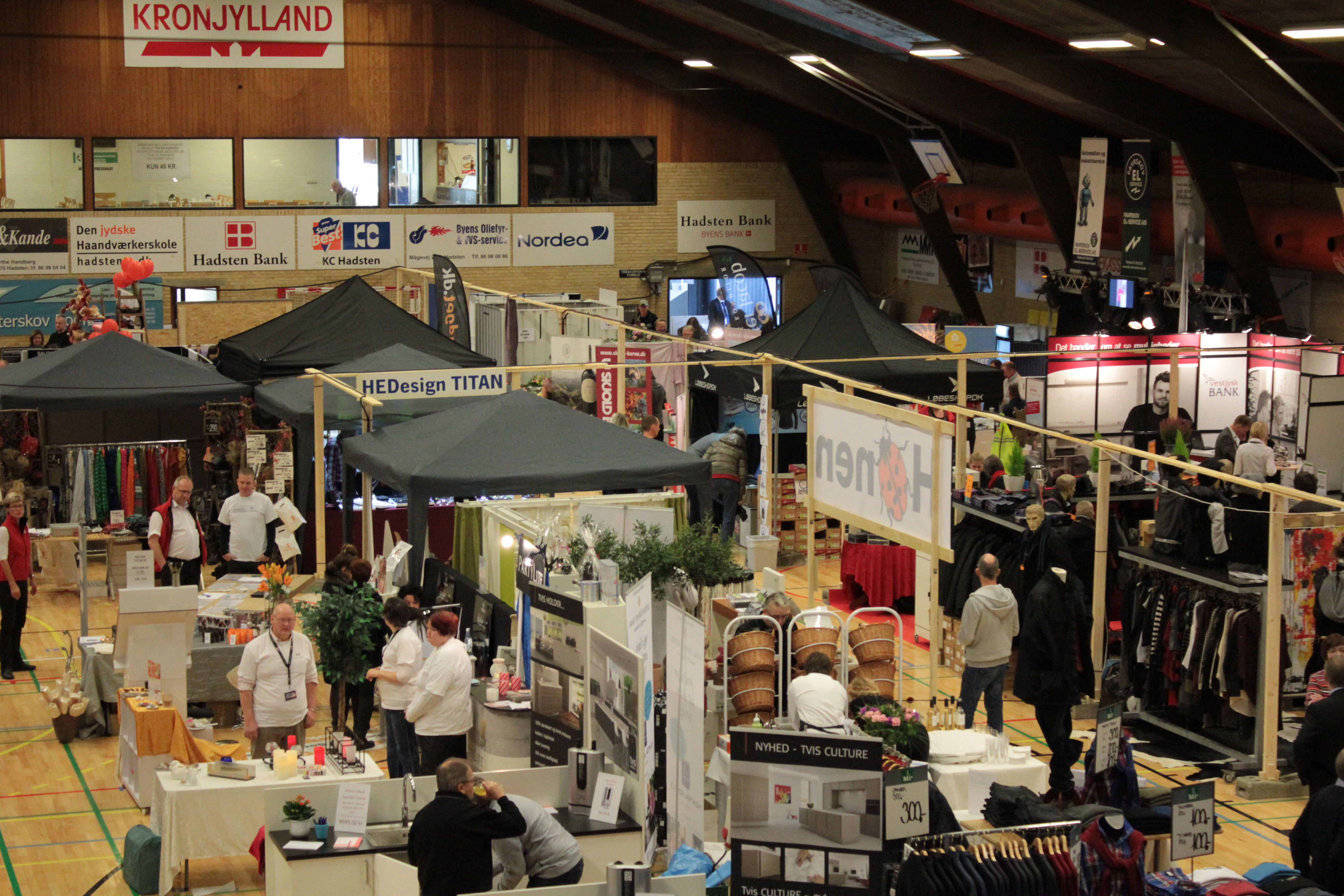 Hadsten Hallen - Familiemesse oktober 2012